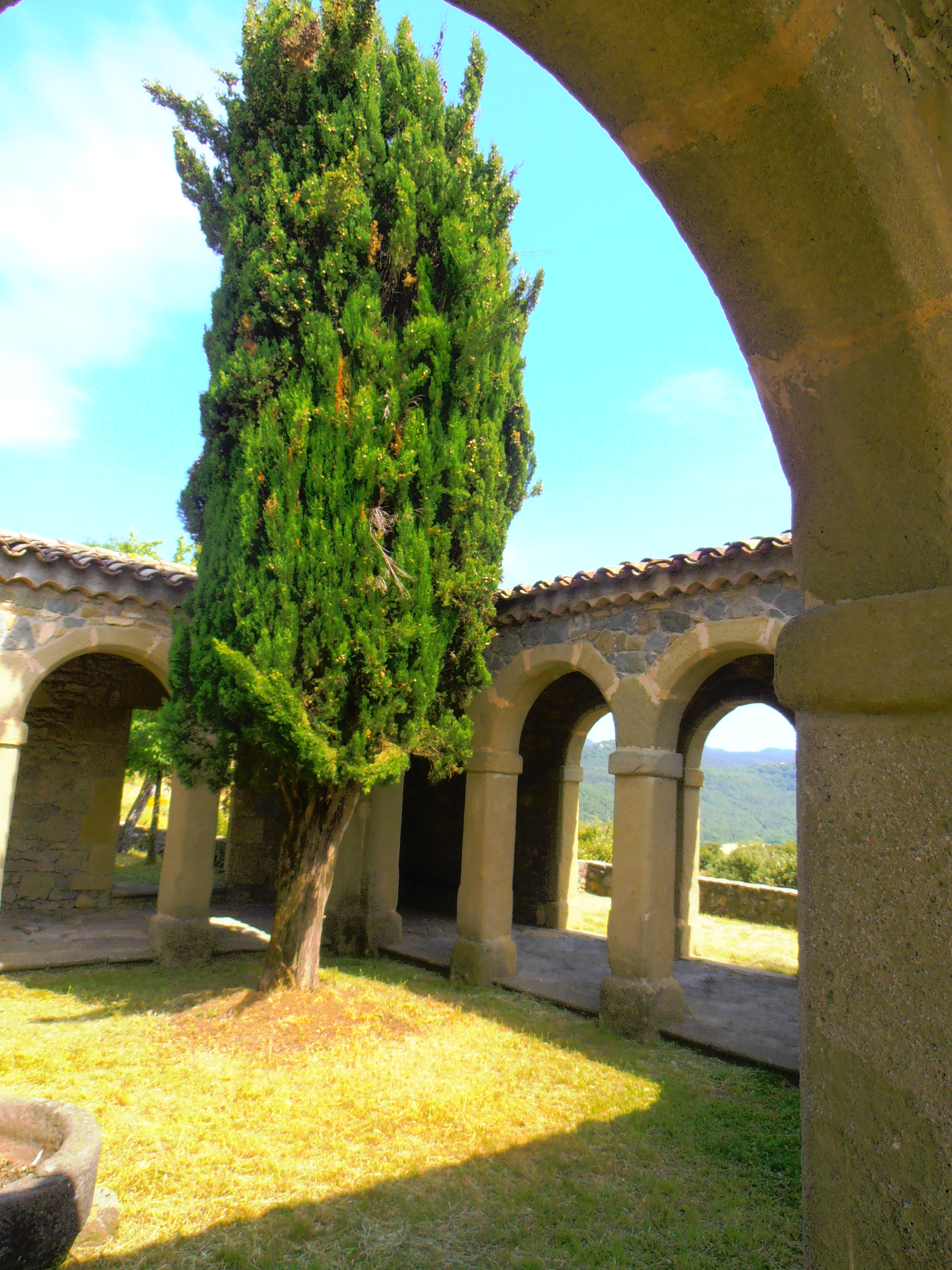 Vista del magnific claustre